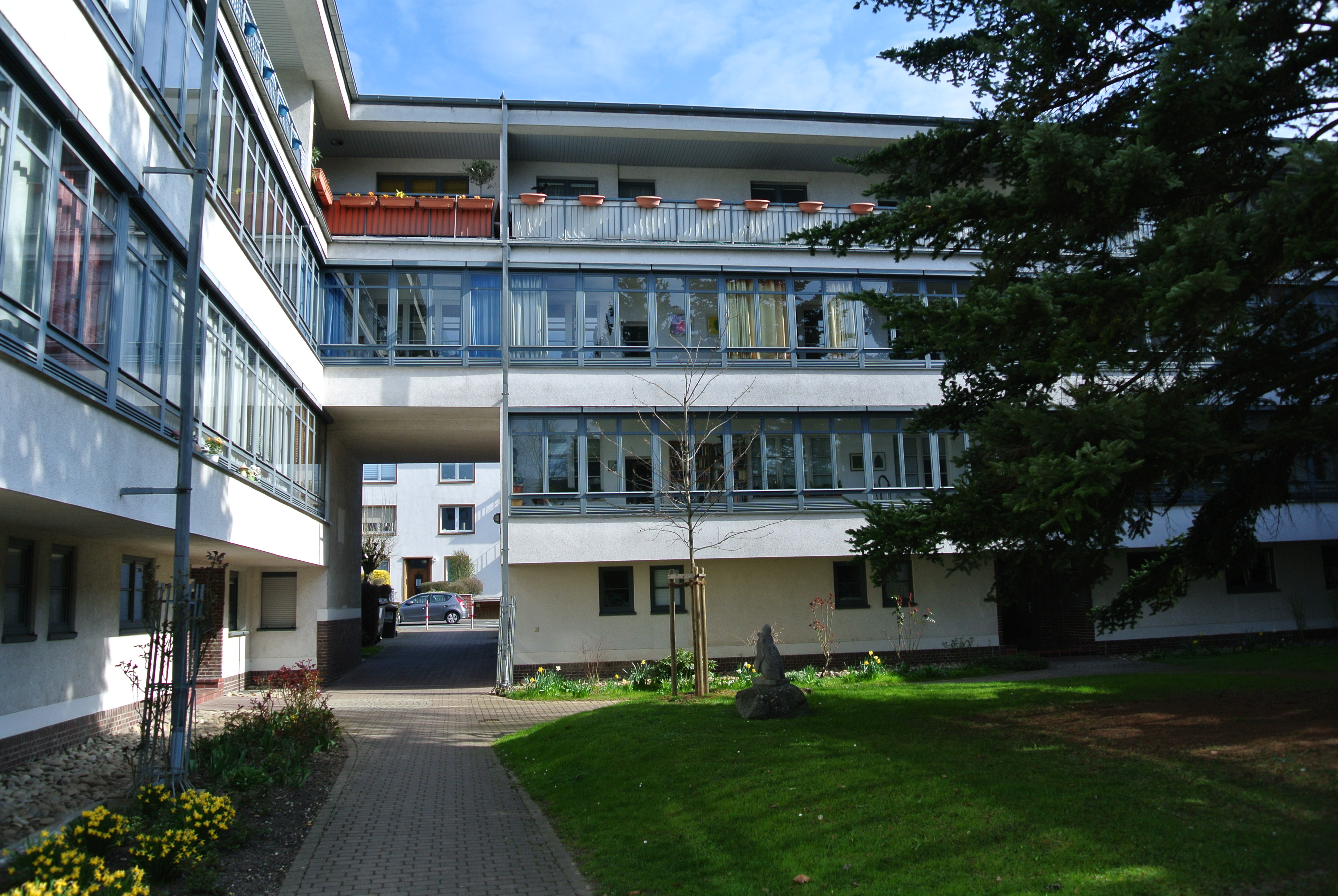 Siedlung Raimundstraße in Frankfurt-Dornbusch, 1928, Fallerslebenstraße